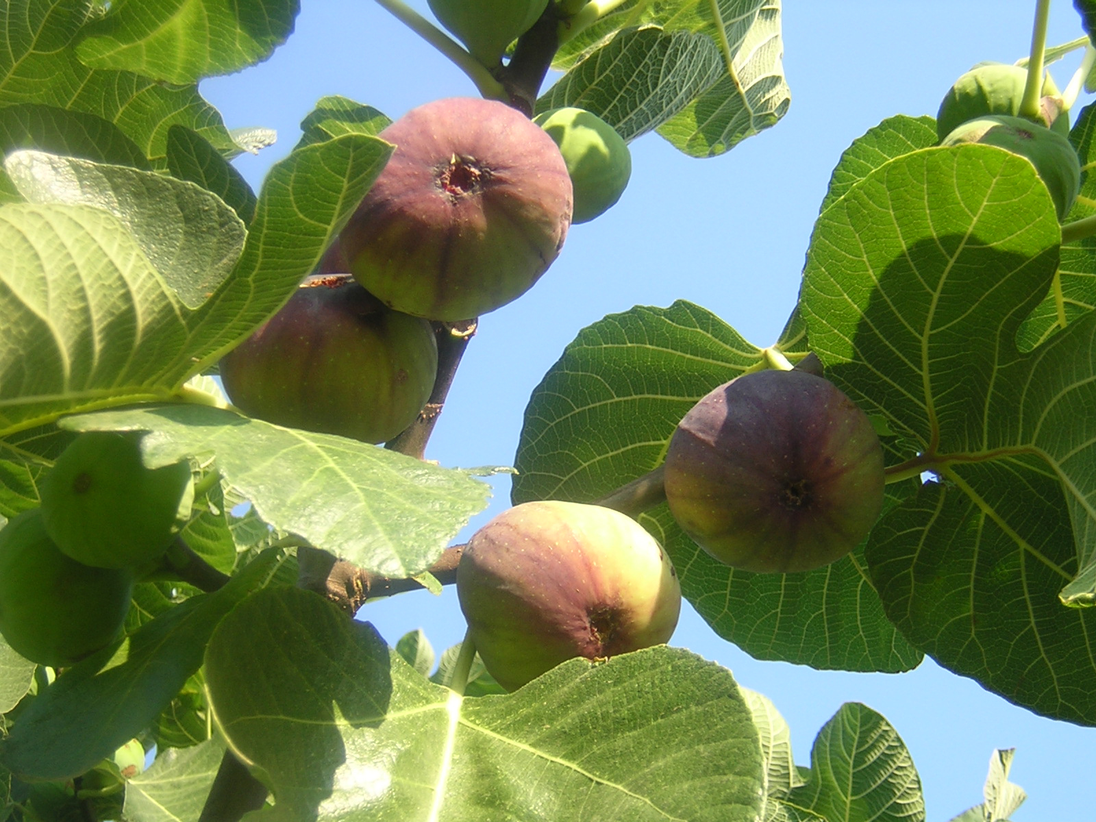 kişisel resim